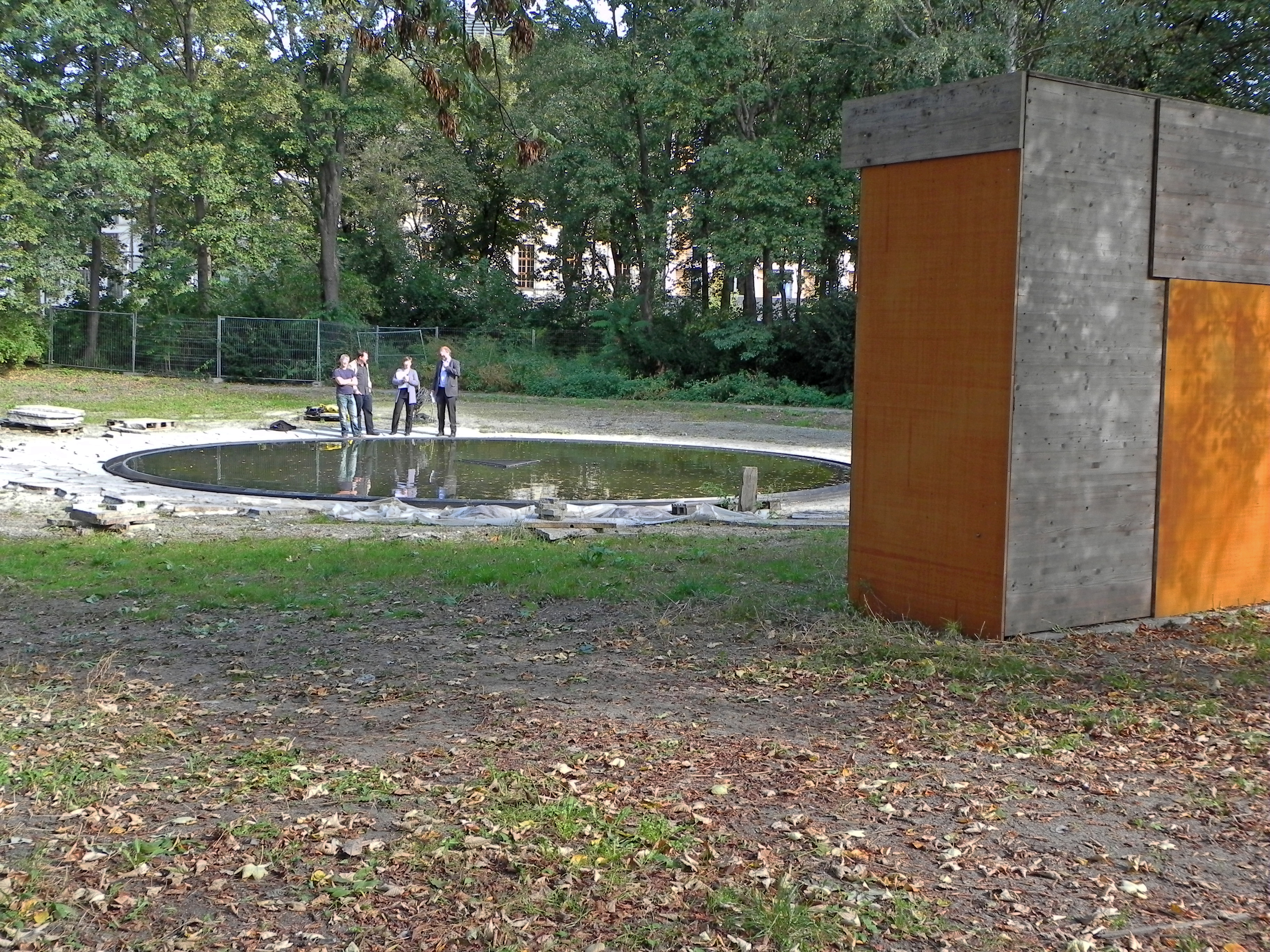 Denkmal für die im Nationalsozialismus ermordeten Sinti und Roma im Bau bzw. in Planung. Zustand am 6. Oktober 2011.